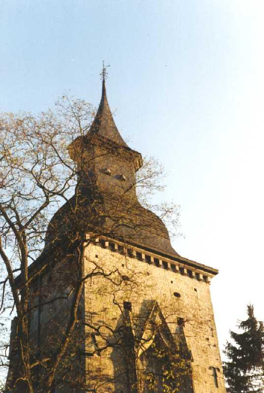 Tour de justice à Grandhan Description: Tour de justice à Grandhan (Durbuy) - 1988 Source: Pierre-Jacques Despa Licence